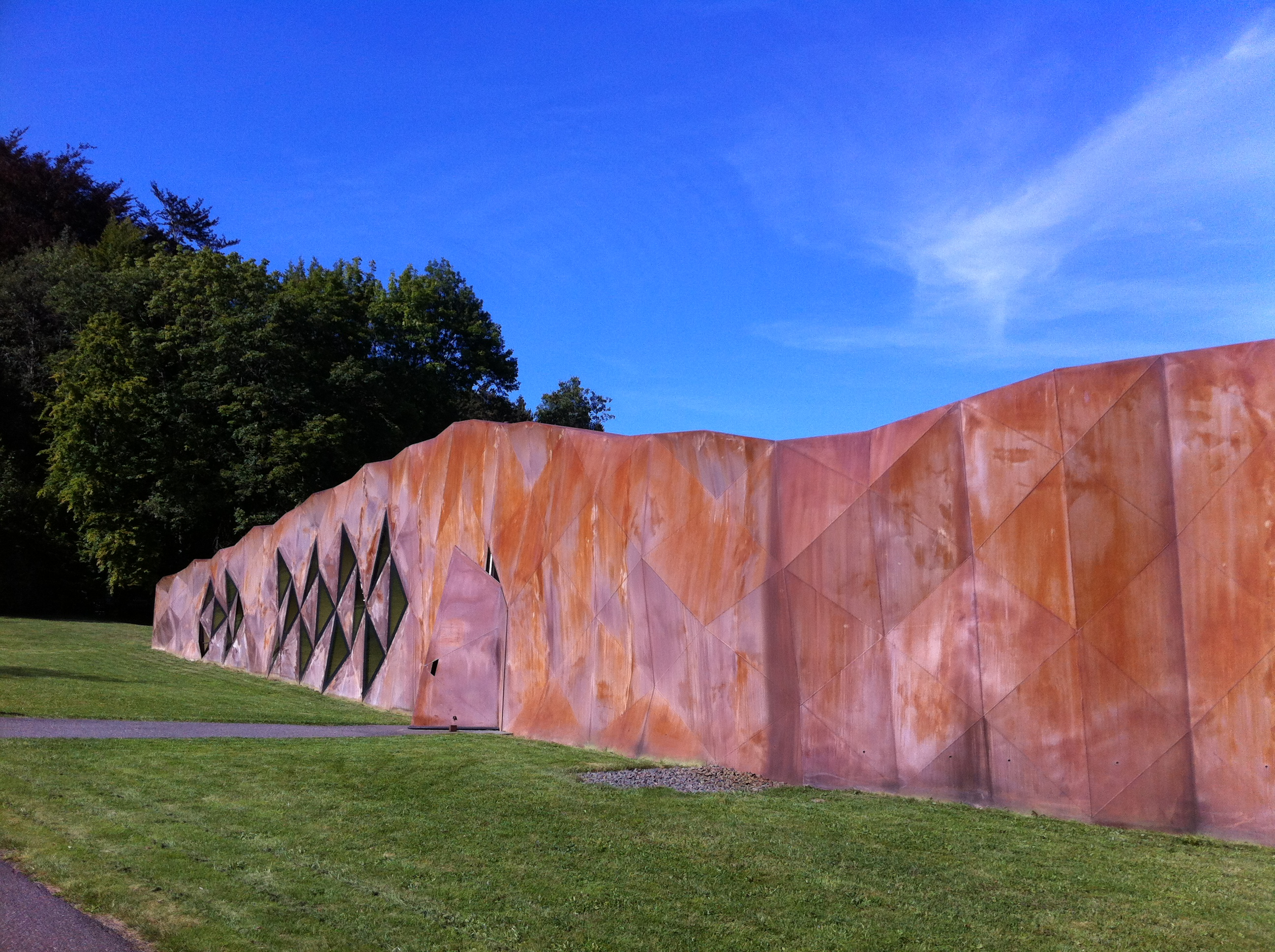 Gedenkstätte Hinzert-Pölert, Rheinland-Pfalz